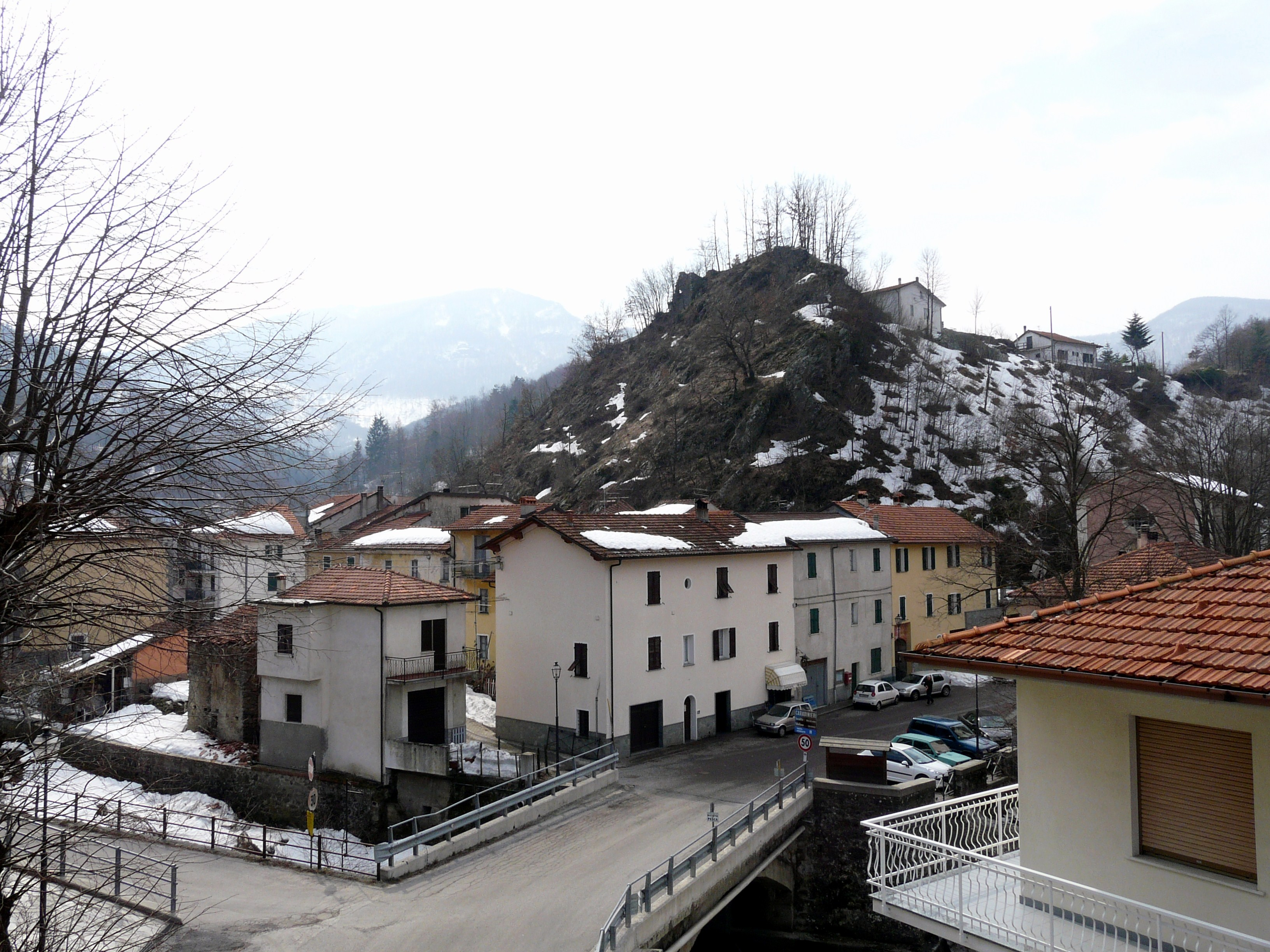 Osiglia, Liguria, Italia